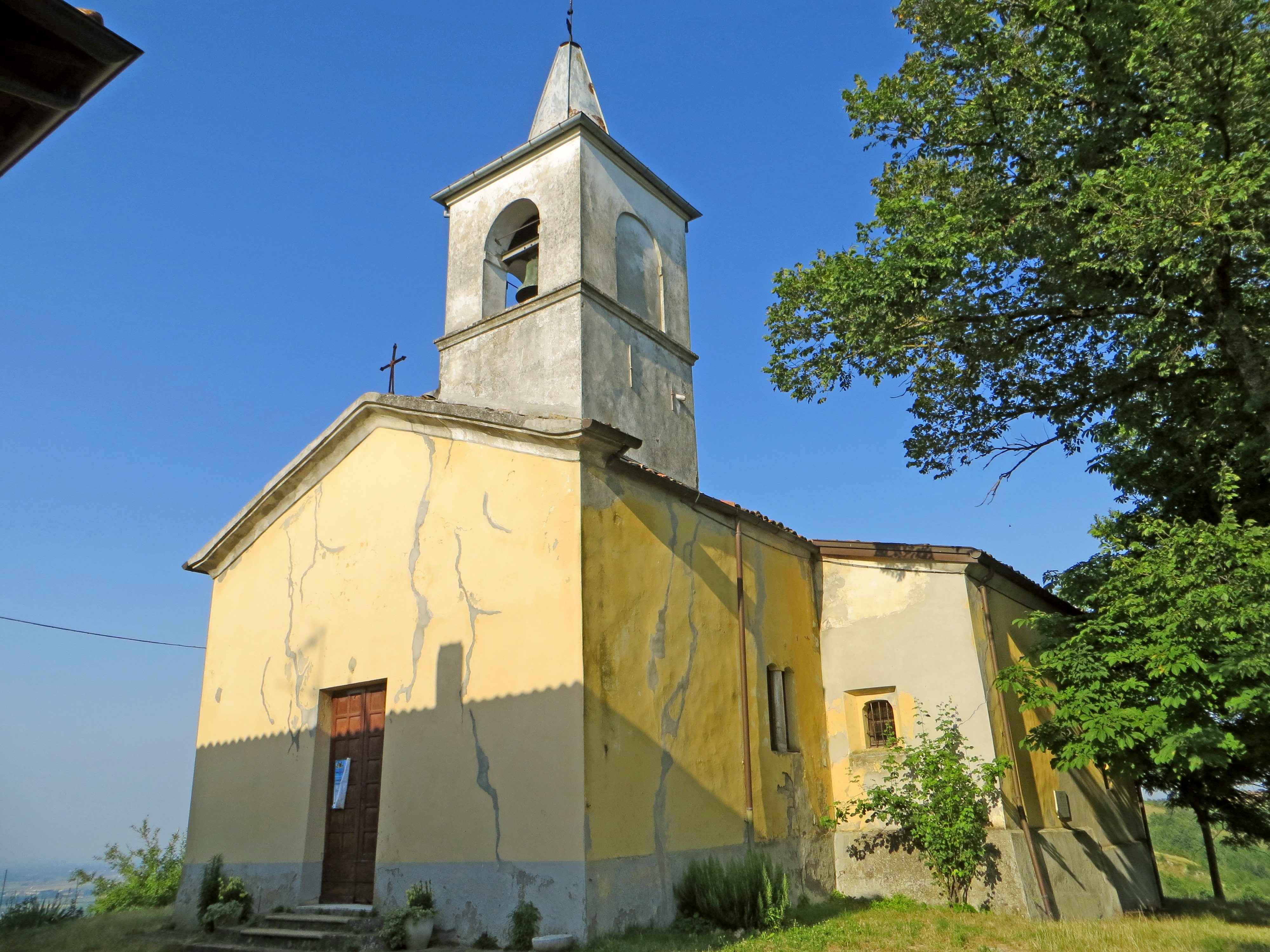 Chiesa di San Michele Arcangelo (Sivizzano, Traversetolo) - facciata e lato sud